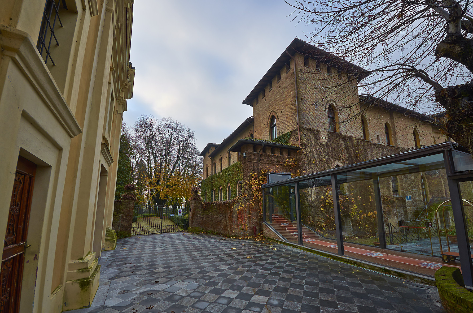 Scorcio del castello